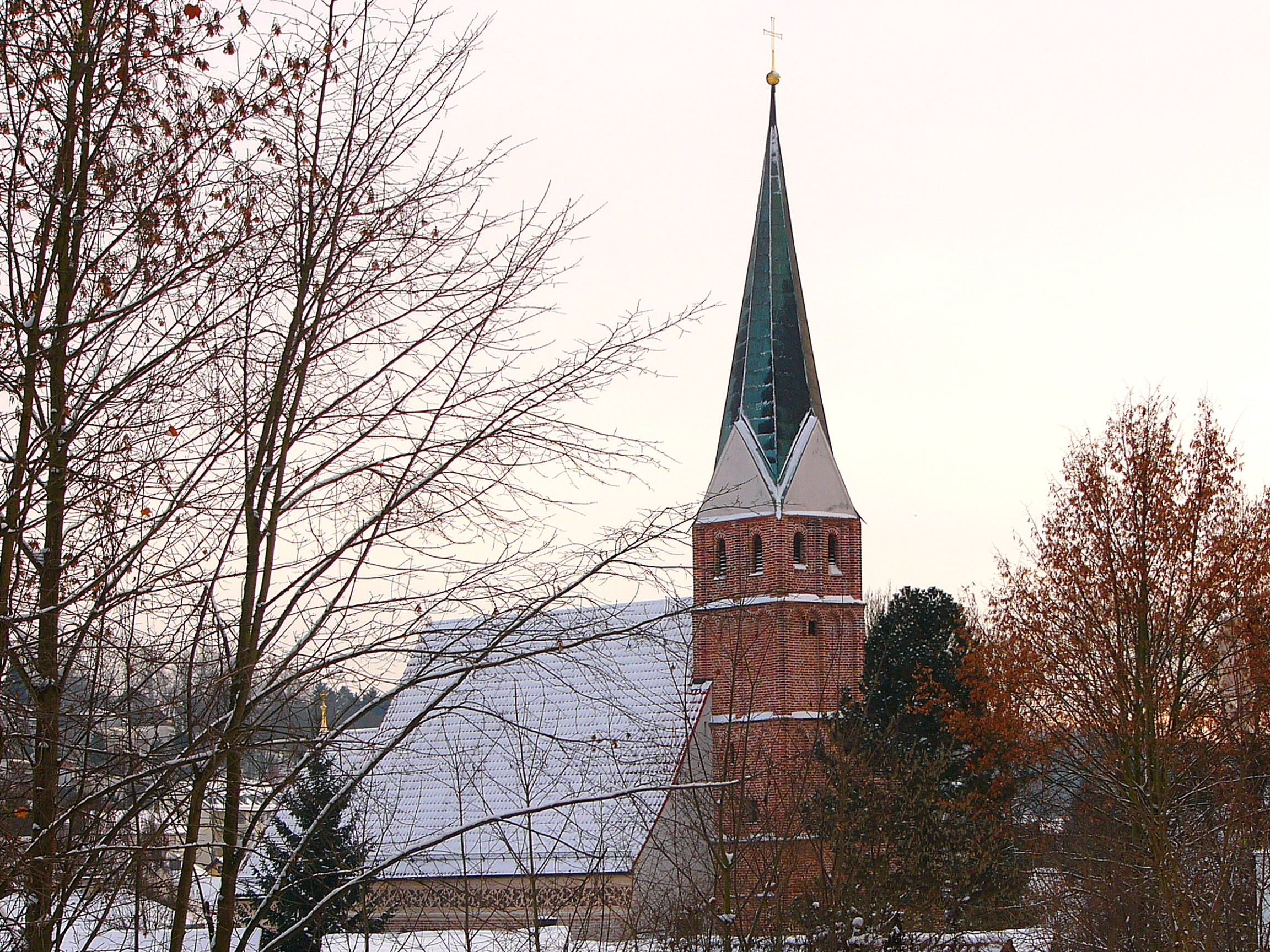 spätgotischer Bau um 1440, in der Barockzeit teilweise verändert; Friedhofskapelle, um 1500; mit Ausstattung; Friedhofsmauer und schmiedeeiserne Grabkreuze This is a photograph of an architectural monument.